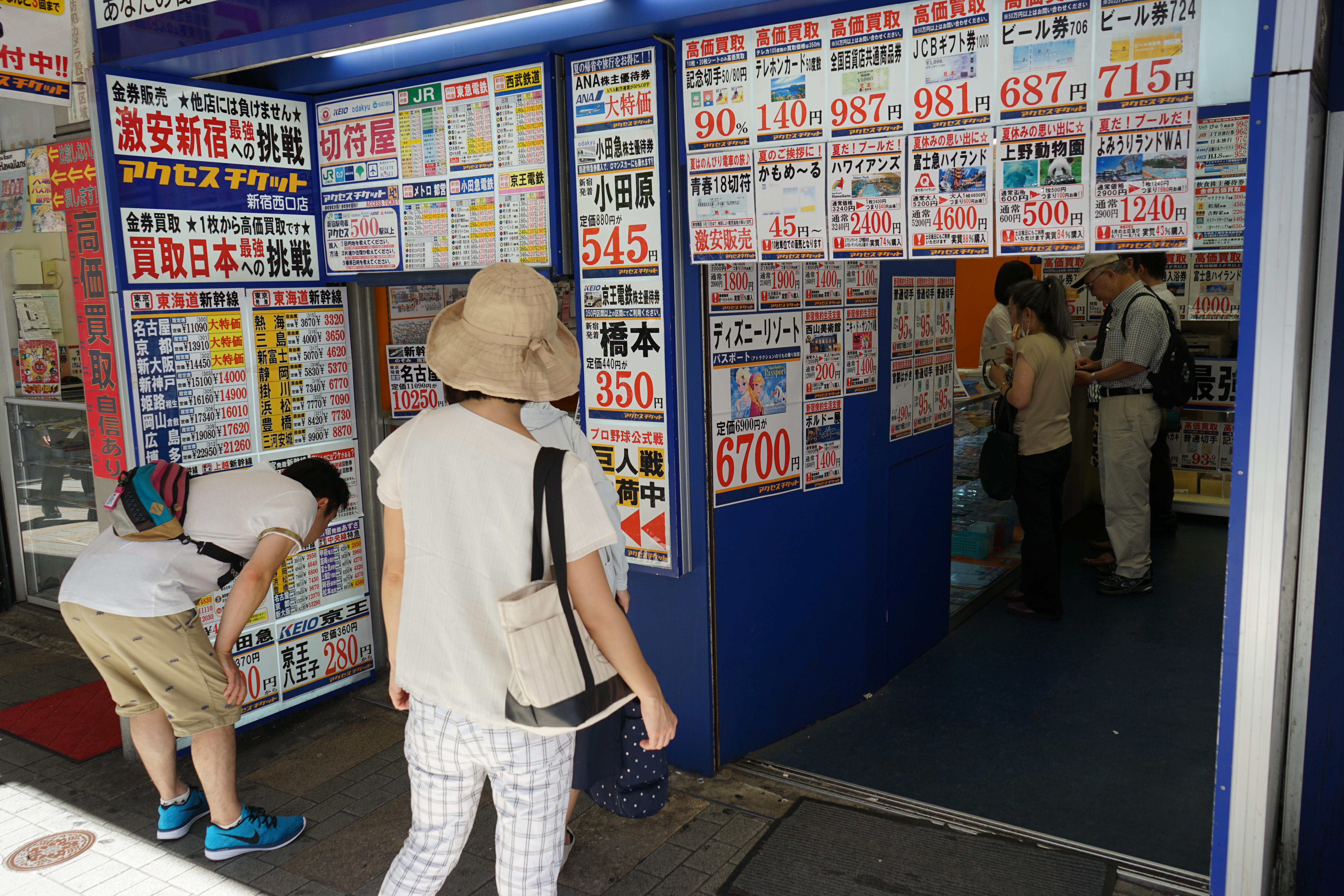 Números